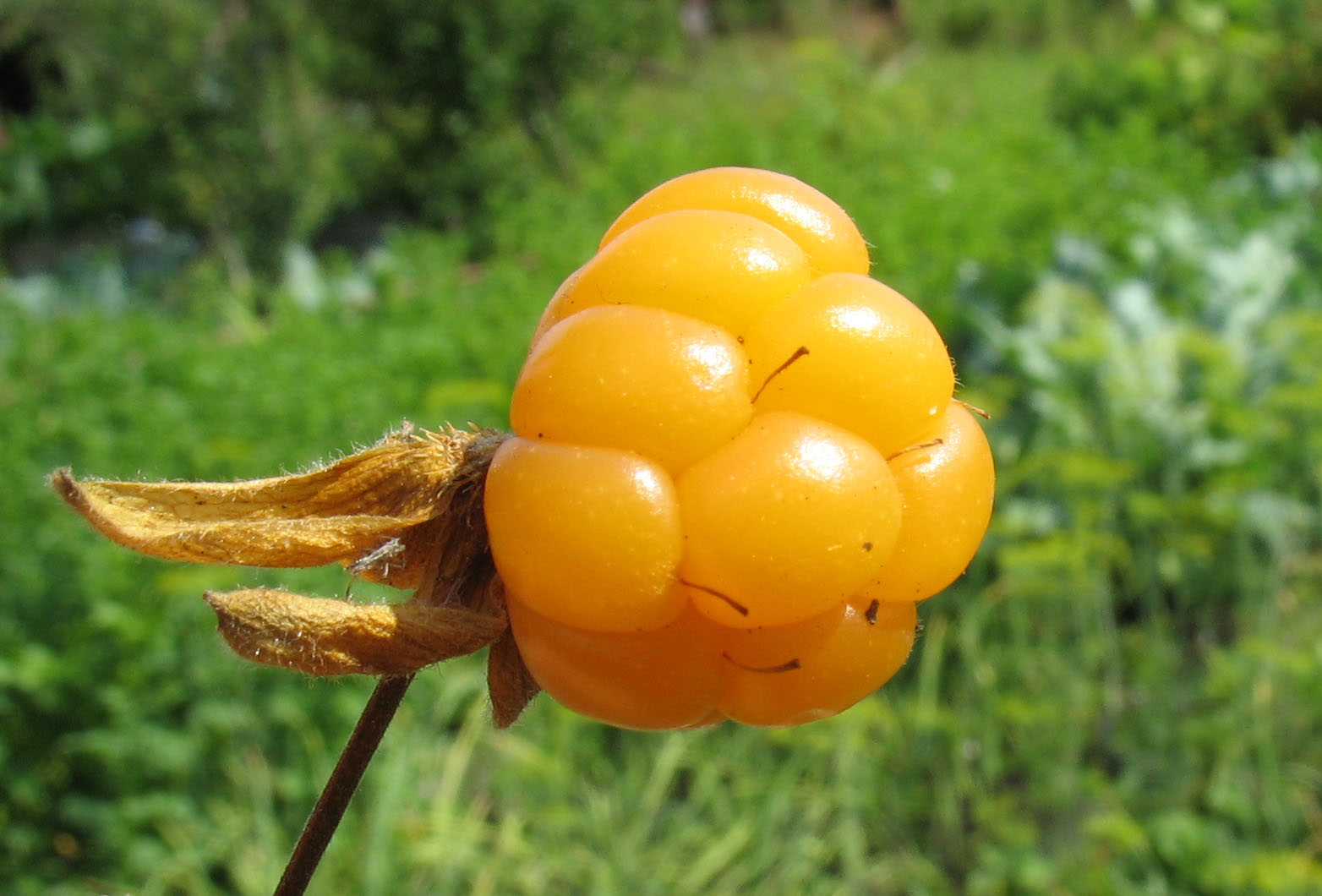 Спелая морошка. Ягода крупным планом